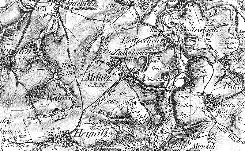 Original image description from the Deutsche Fotothek Triebischtal-Miltitz. Ausschnitt aus: Oberreit, Sect. Freiberg, vor 1843